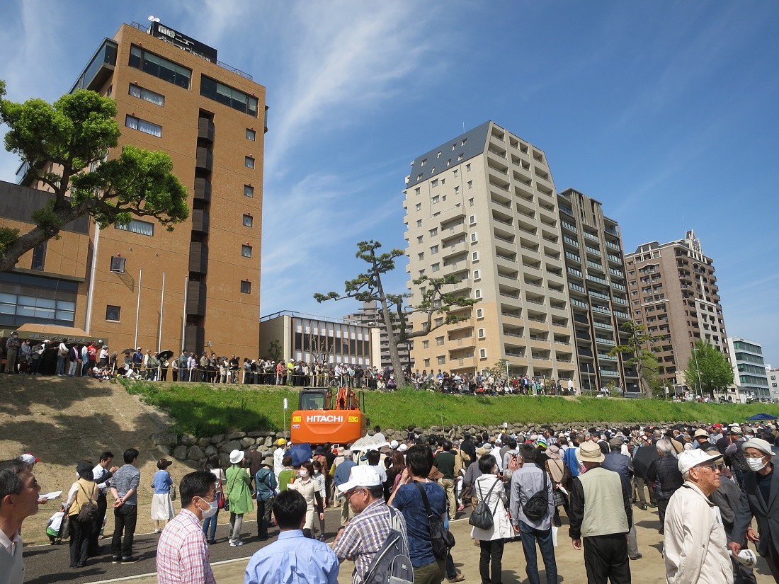 岡崎城跡・菅生川端石垣の現地説明会